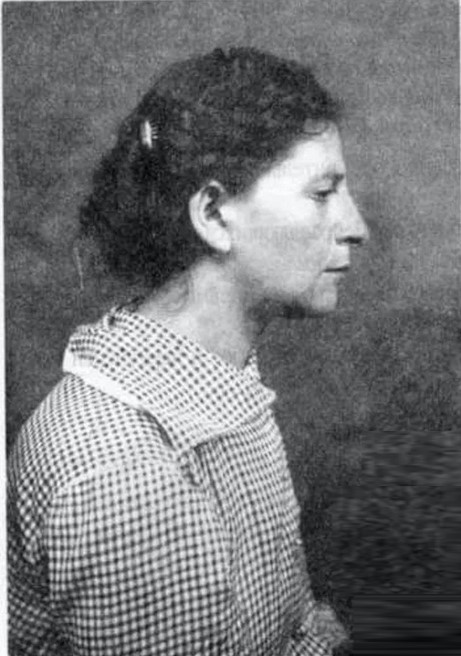 Bild von 1907